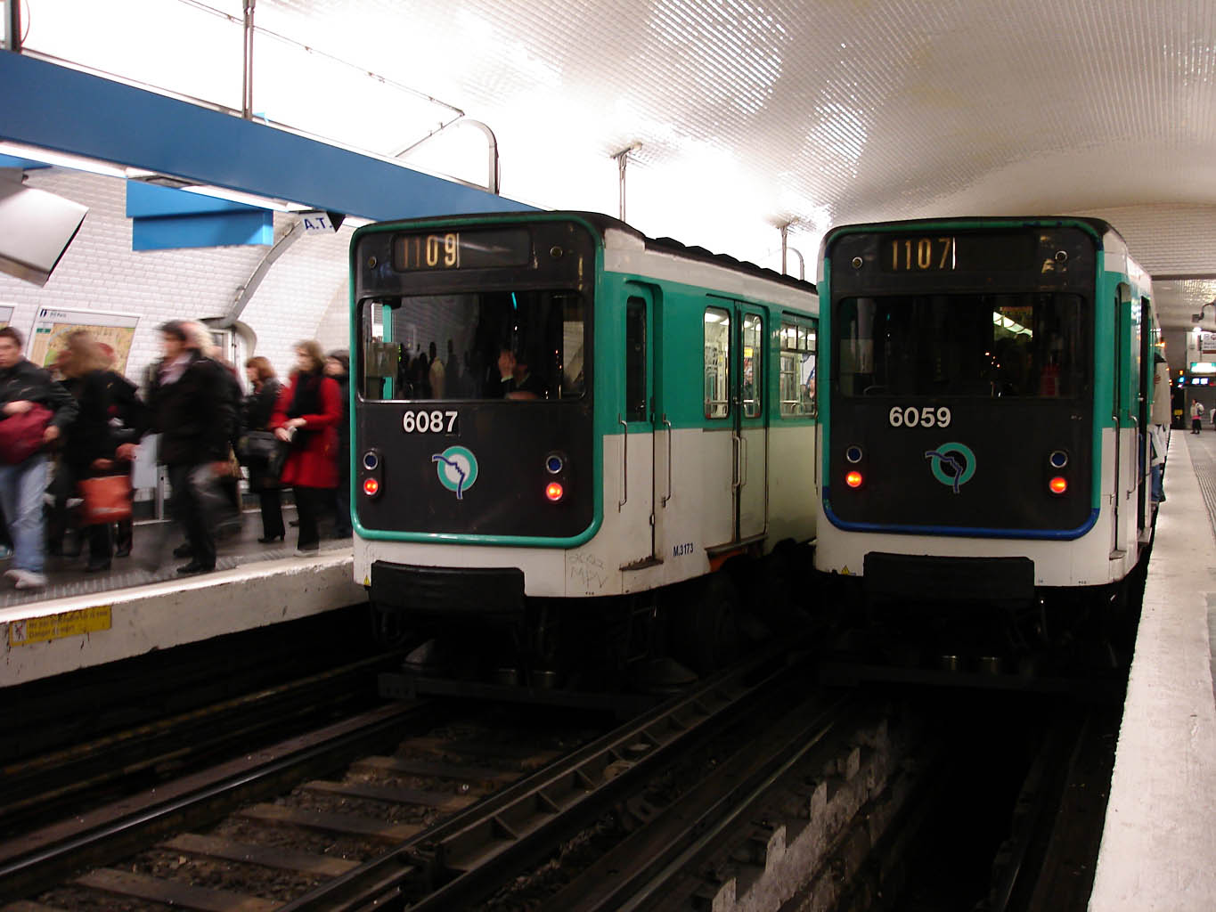 Métro de Paris (France) - ligne 11 - MP 59 à la station Châtelet